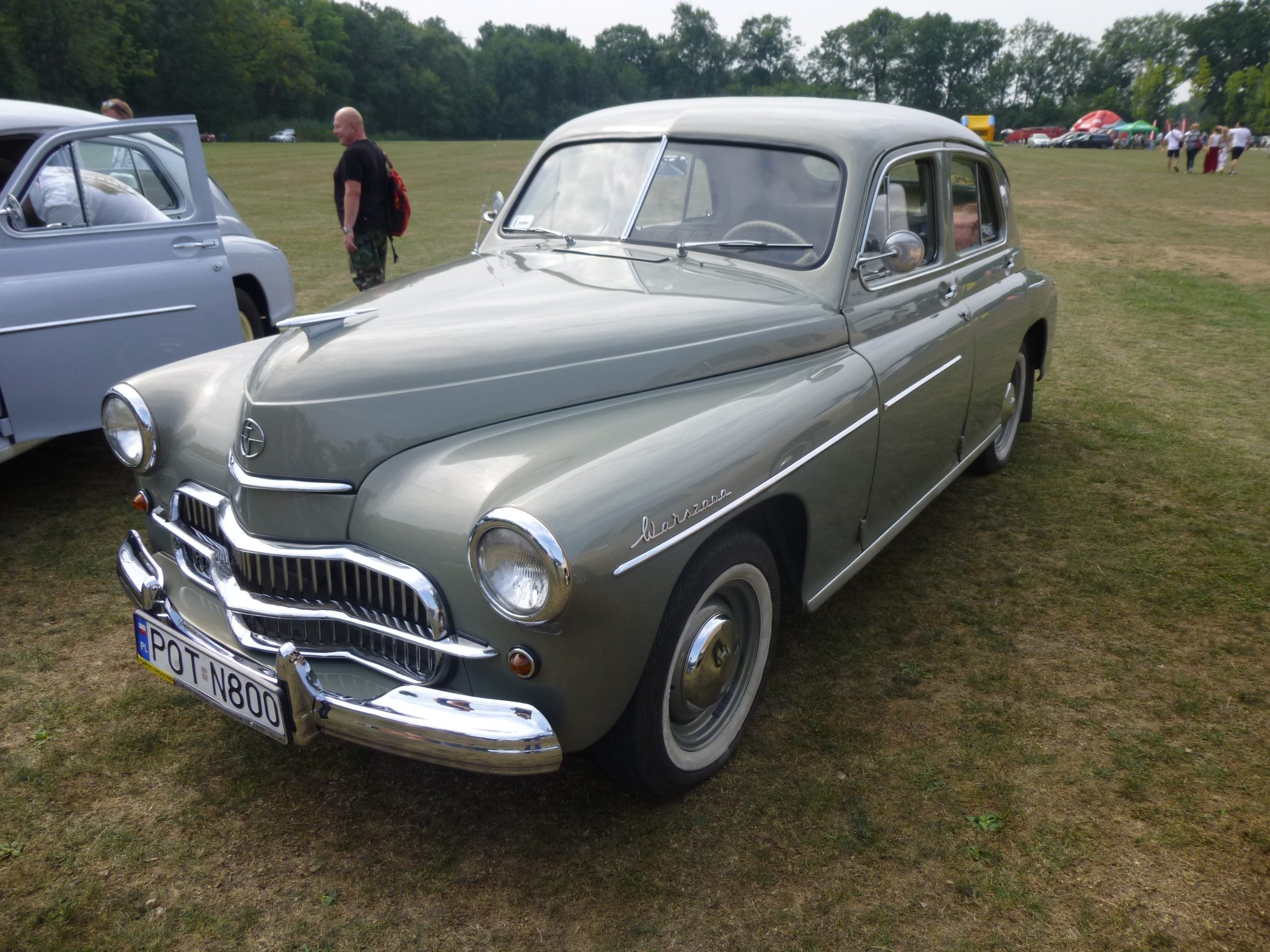 FSO Warszawa M20 at 2015 Motoclassic Wrocław